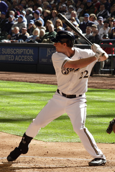 Logan Schafer